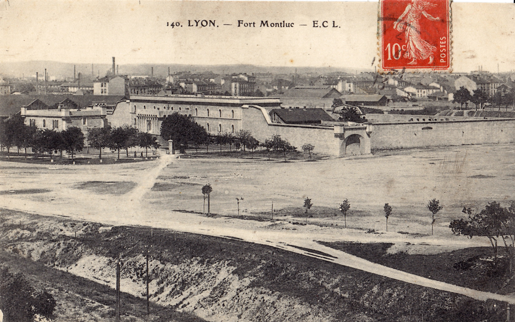 Carte postale ancienne éditée par ECL, n°140 : LYON - Fort Montluc. Au premier plan, la ligne du Chemin de fer de l'Est de Lyon, dont l'emprise est utilisée par la ligne T3 du tramway de Lyon